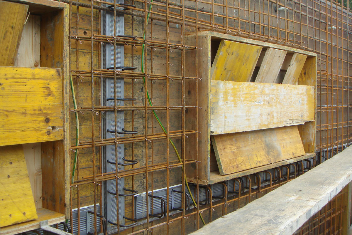 In der Holzverschalung befestigte COMAX Rückbiegeanschlüsse vor dem Einbetonieren.